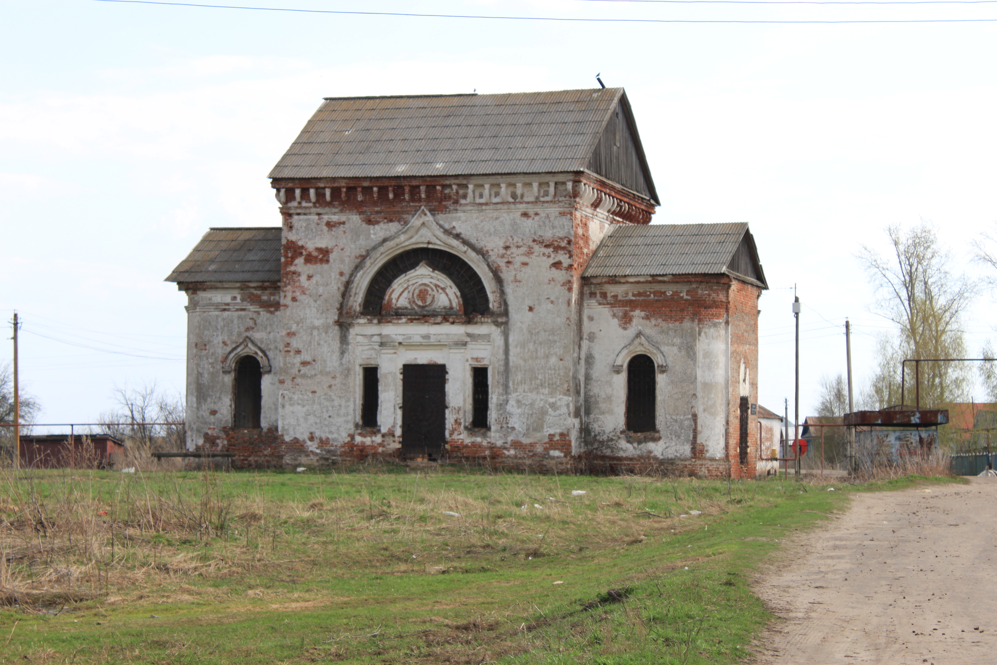 Церковь в Пятницах Арзамасский район